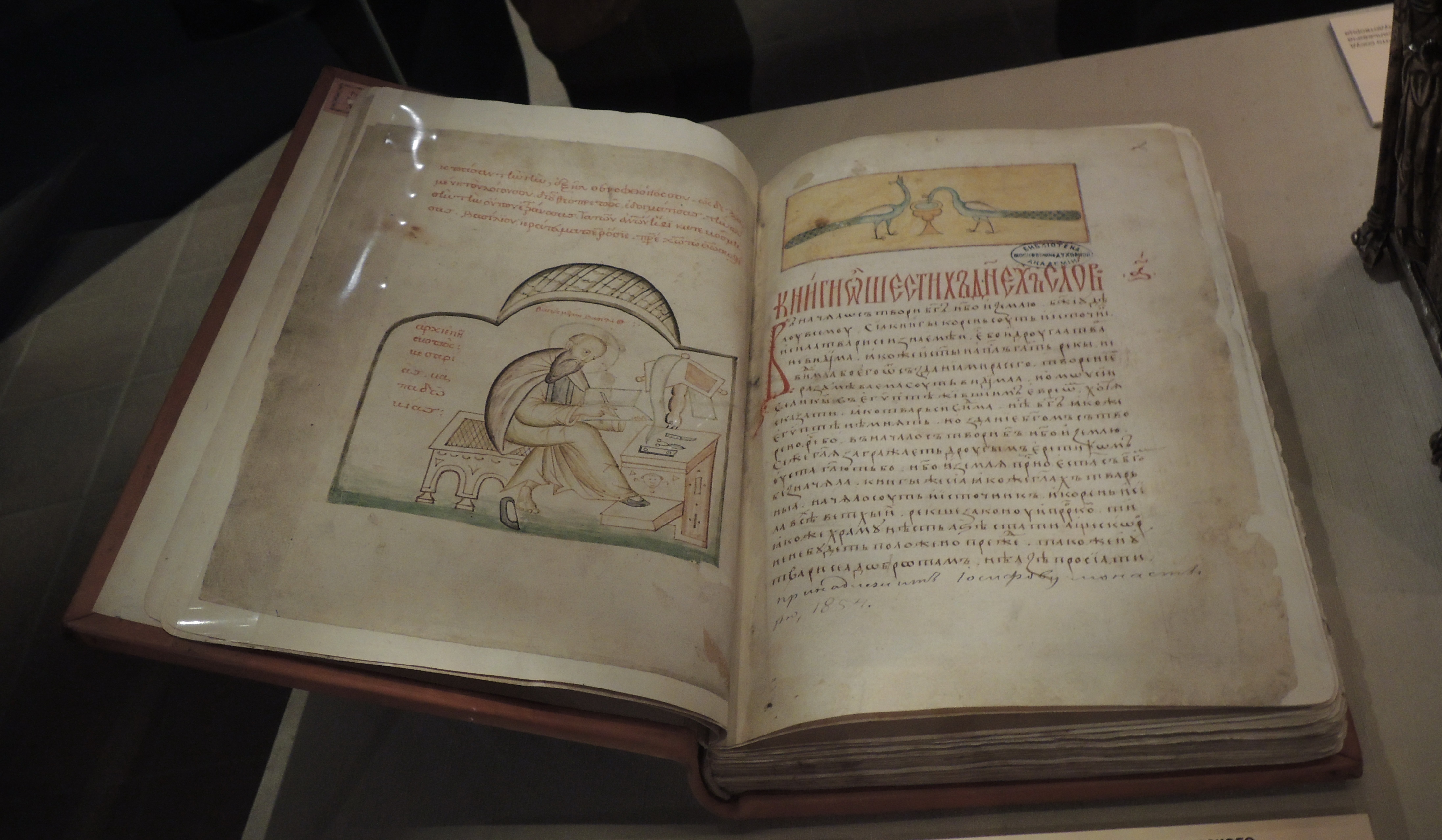 Выставка "Великий князь и государь всея Руси Иван III"